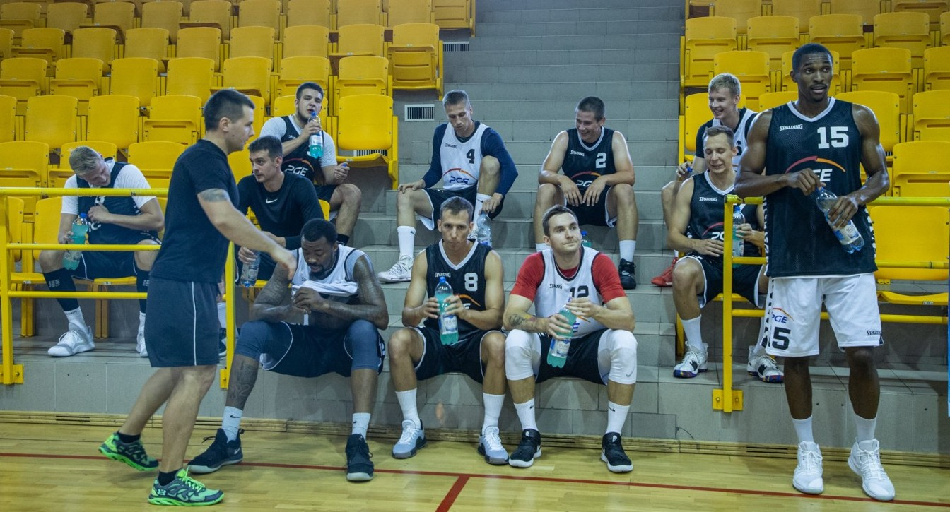 Koszykarze PGE Spójnia, 26.08.2019